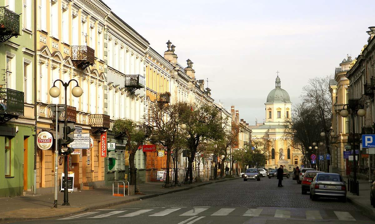 Ulica Piłsudskiego, widok z ul.Traugutta.